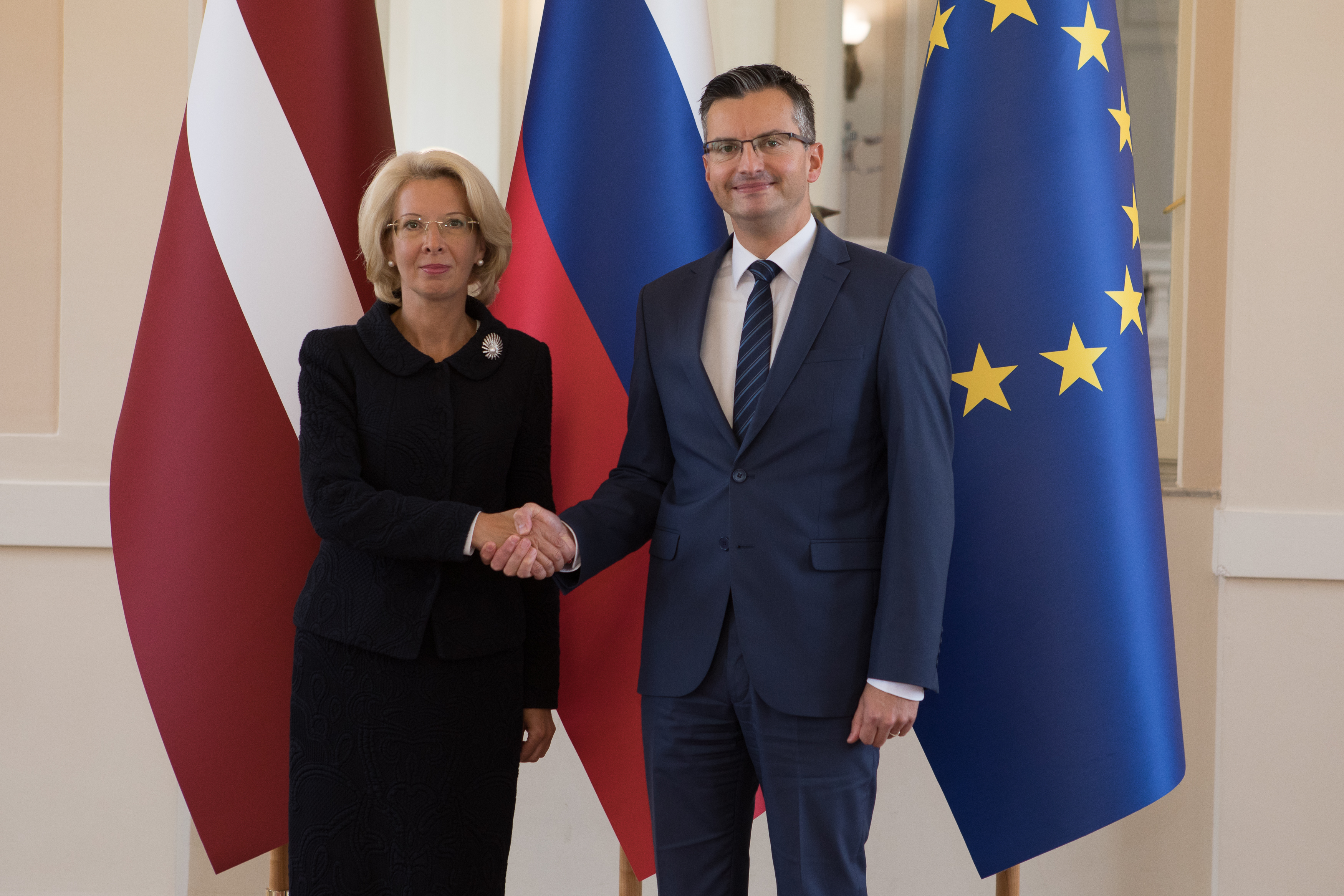 2019.gada 10.septembris. Ināra Mūrniece tiekas ar Slovēnijas premjerministru Marjanu Šarecu (Marjan Šarec). Foto: Ernests Dinka, Saeima Izmantošanas noteikumi: saeima.lv/lv/autortiesības